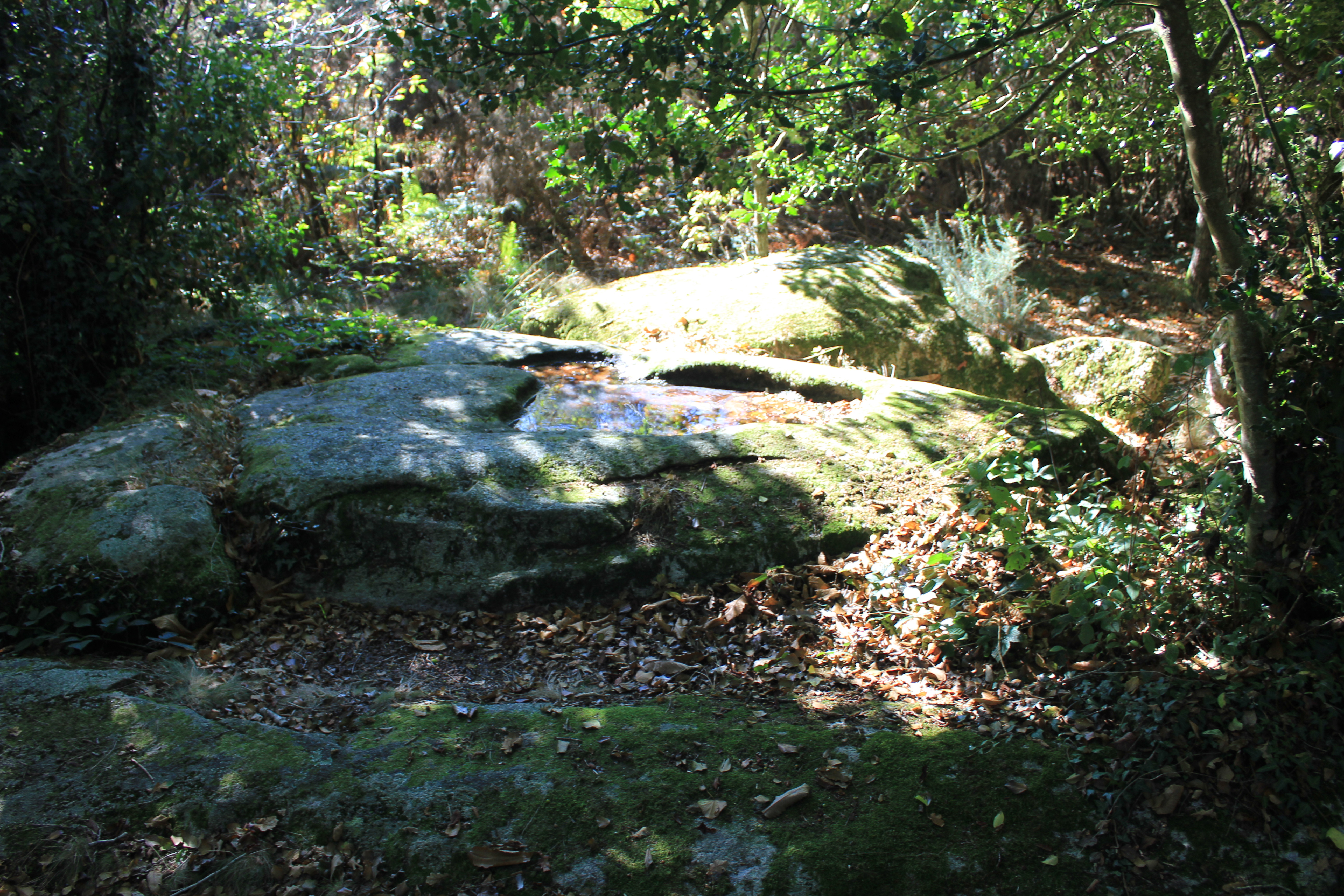 Menhir de Kerara (Moustoir-Ac) .